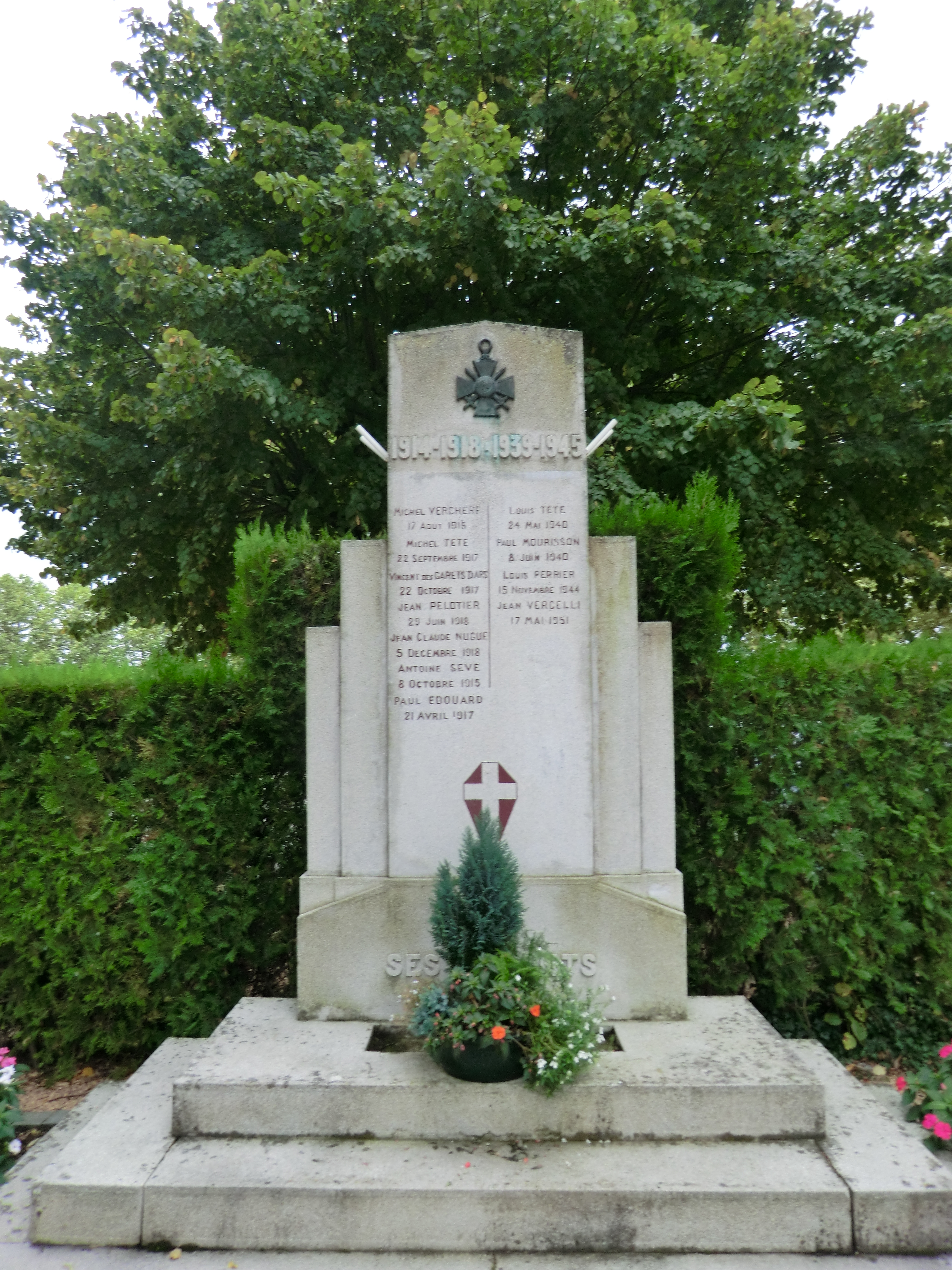 Monument aux morts d'Ars.